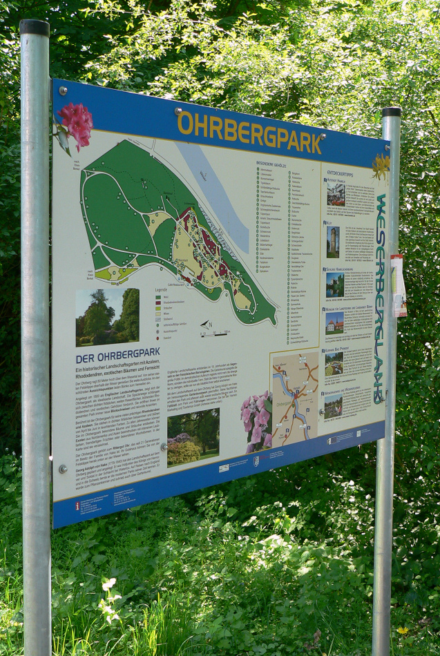 Schild im Ohrbergpark